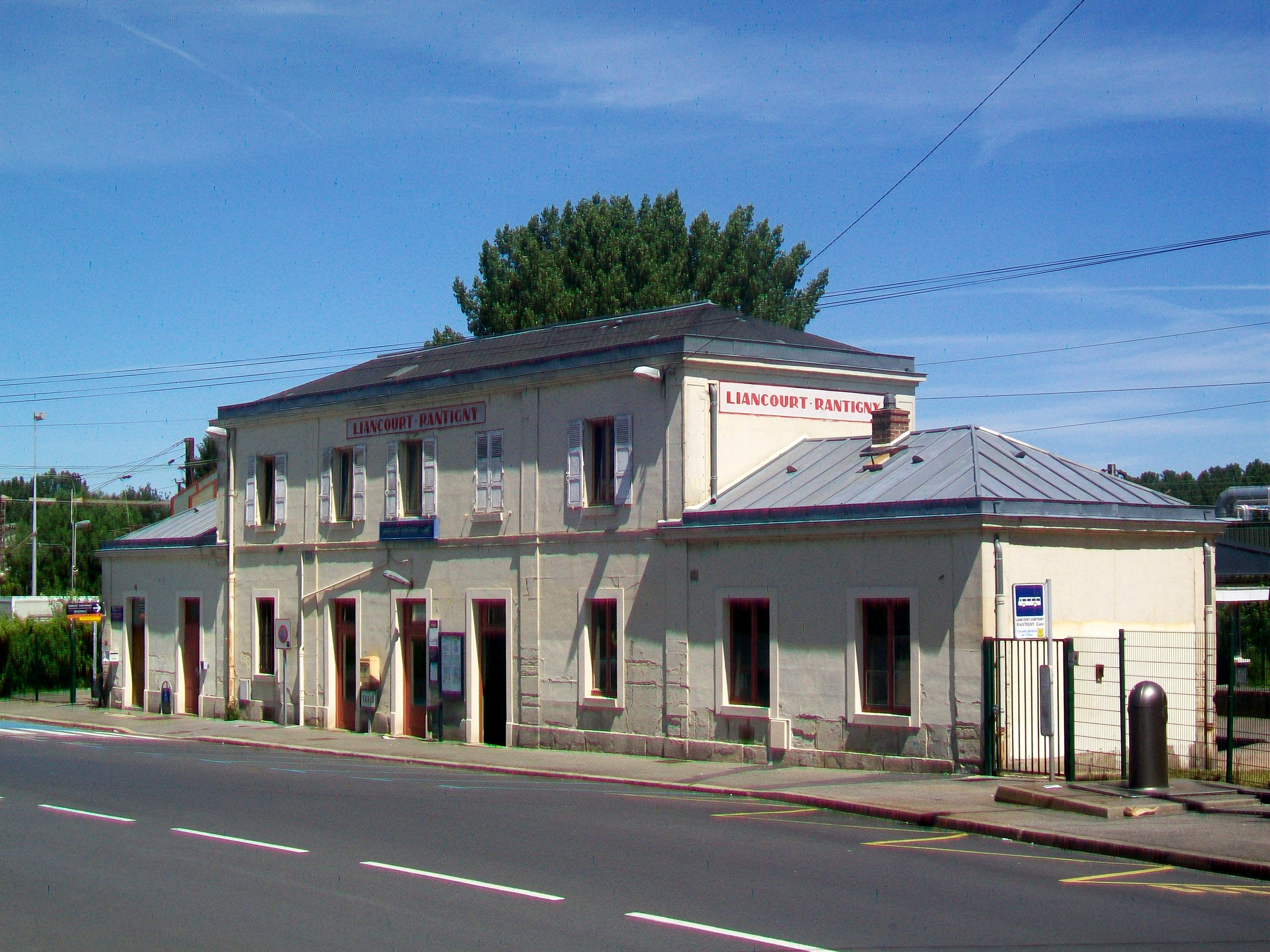 Gare de Liancourt - Rantigny, à Rantigny, département de l'Oise, France : vue de la façade du bâtiment voyageurs, sur la place de la gare côté Rantigny.